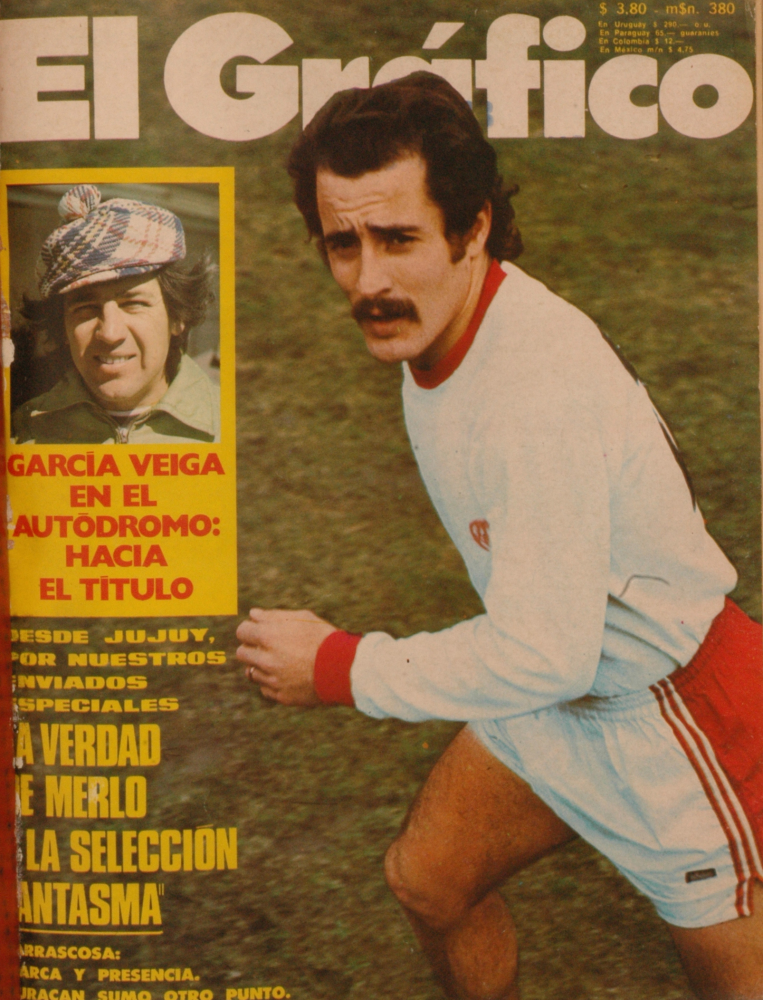 El Grafico del 28 de Agosto de 1973. Edicion 2812